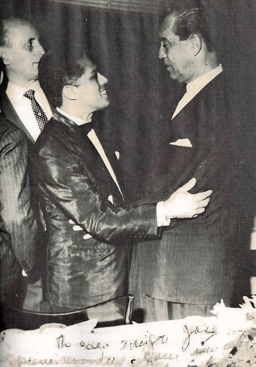 Juscelino e José Epaminondas de Souza, OSN 1961